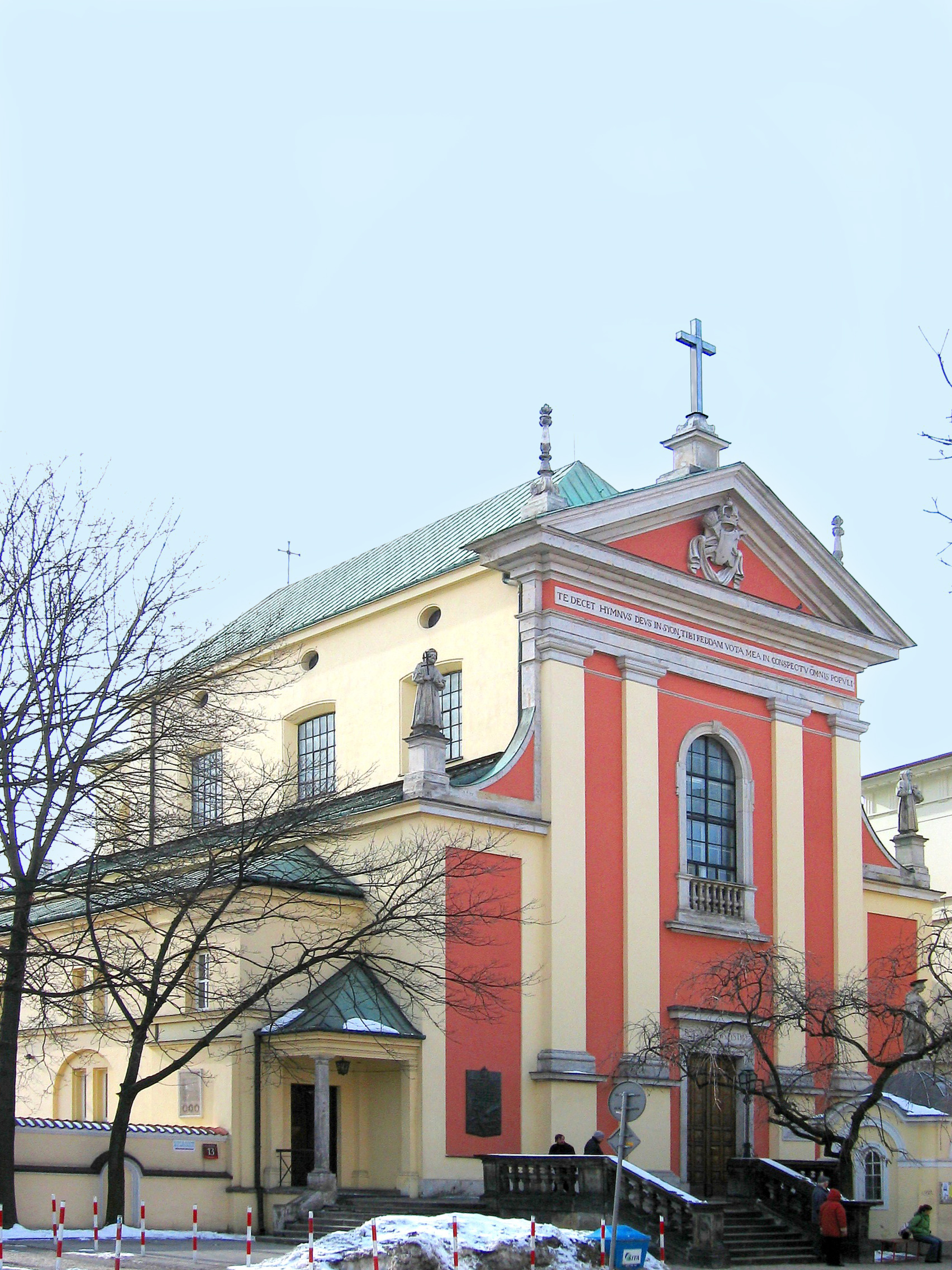 Warszawa, ul. Miodowa 13 - kościół Przemienienia Pańskiego (kościół Kapucynów). Powstał wraz z klasztorem w latach 1683-1694 z inicjatywy króla Jana III Sobieskiego jako wotum dziękczynne za zwycięstwa w bitwach pod Chocimiem i pod Wiedniem. author-Maciej Szczepańczyk-user Mathiasrex